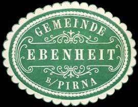 Sealing stamp Title: Gemeinde Ebenheit bei Pirna Description: grün, weiß, geprägt Place: Ebenheit size: 3x4 cm